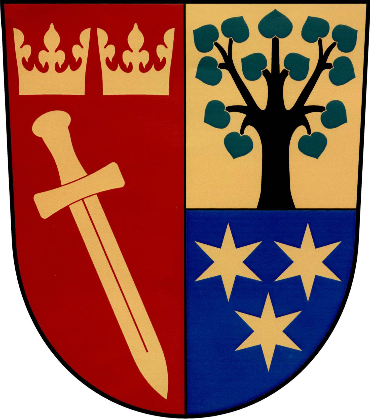 Znak obce Kraborovice